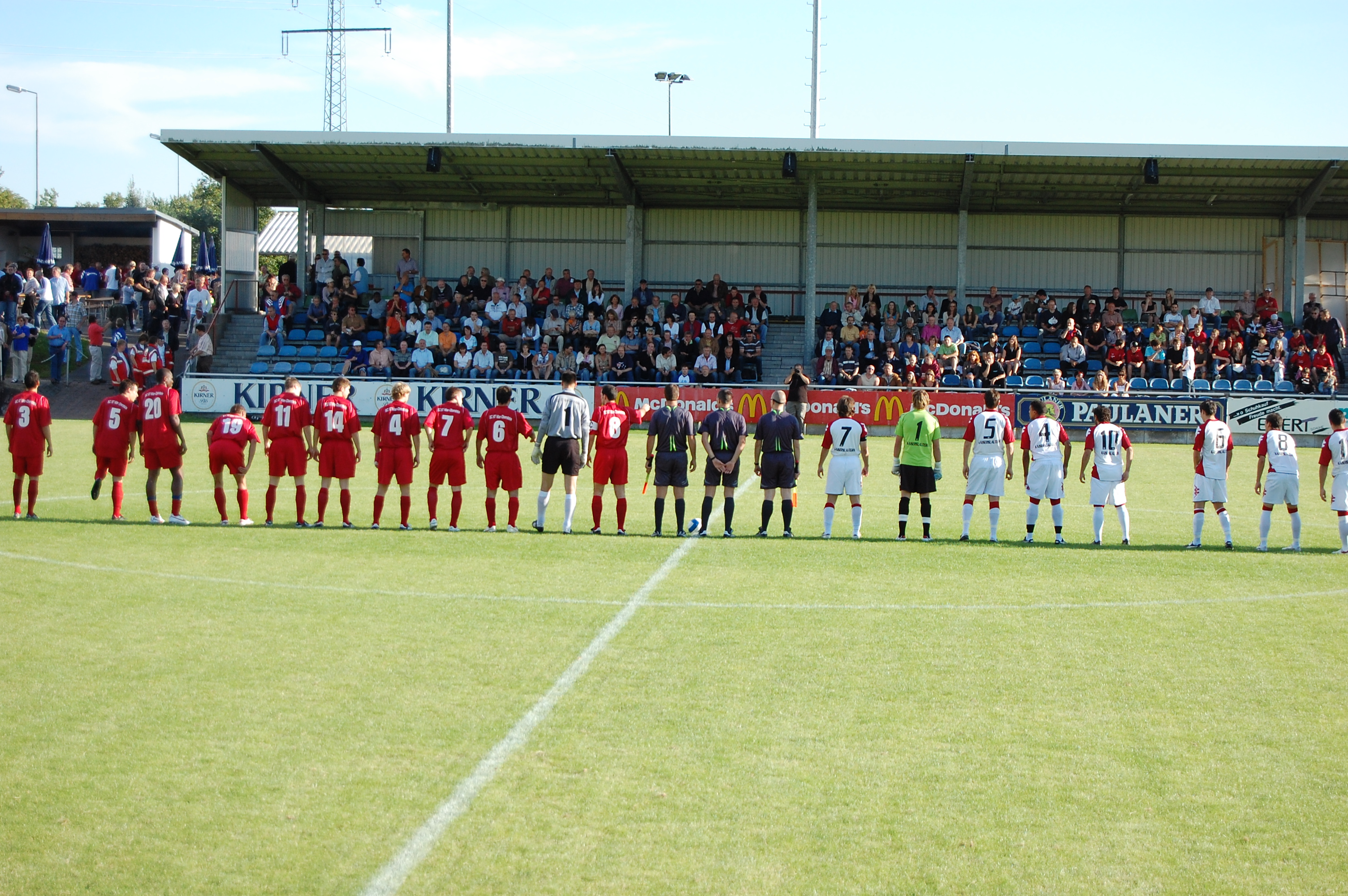 Sportzentrum Im Haag in Idar-Oberstein